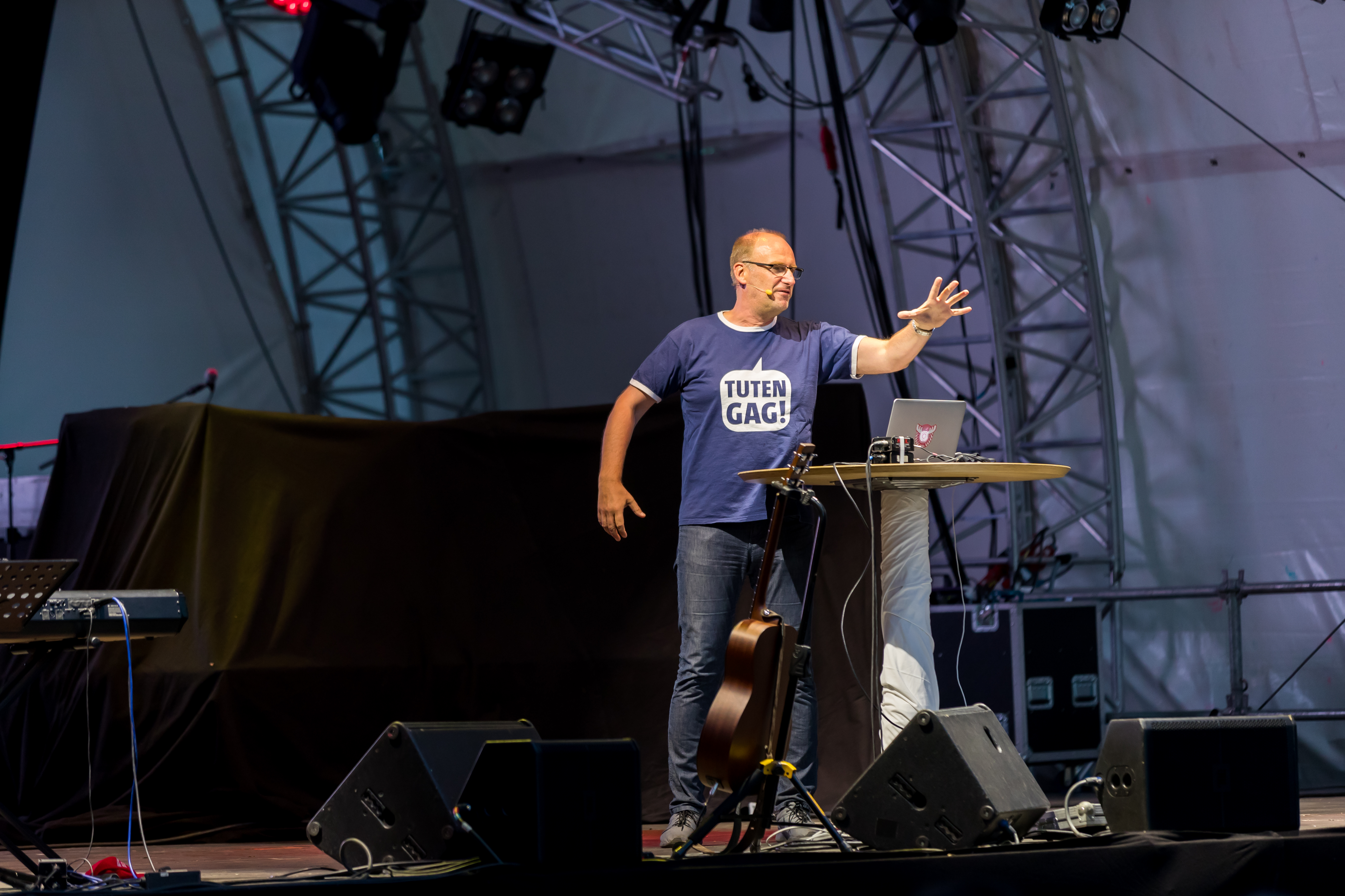 Andreas Müller during Stadtfest Ludwigshafen at Berliner Platz, Ludwigshafen, Rheinland-Pfalz, Germany on 2017-06-23, Photo: Sven Mandel